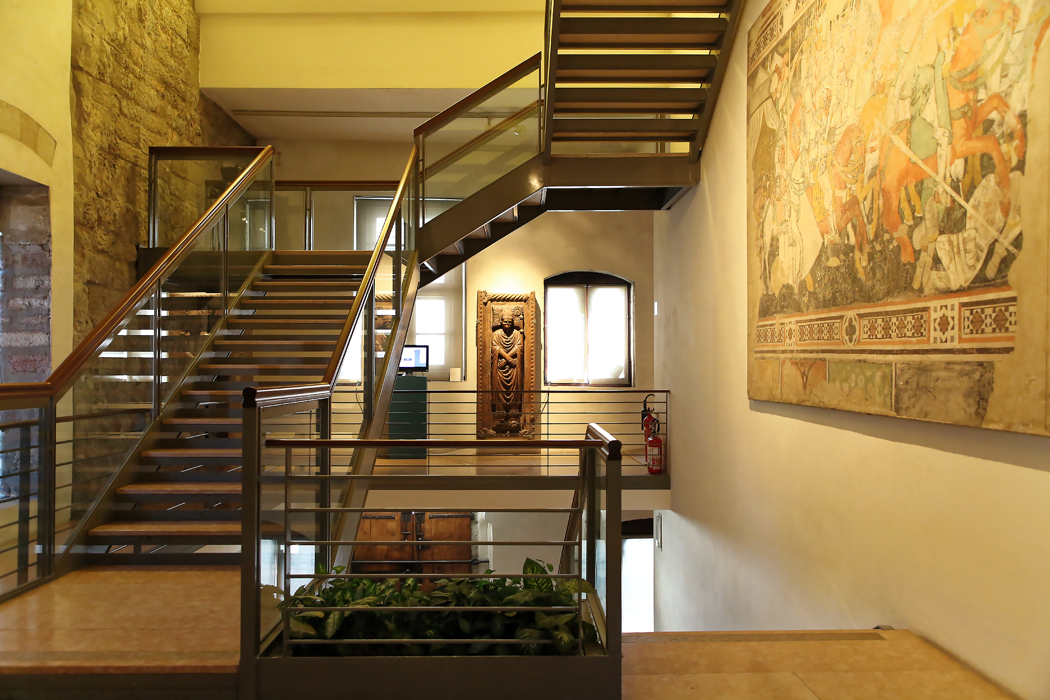 Treppenhaus